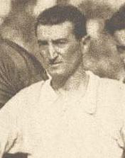 Jose Vanzzino con la Selección de Uruguay en 1926